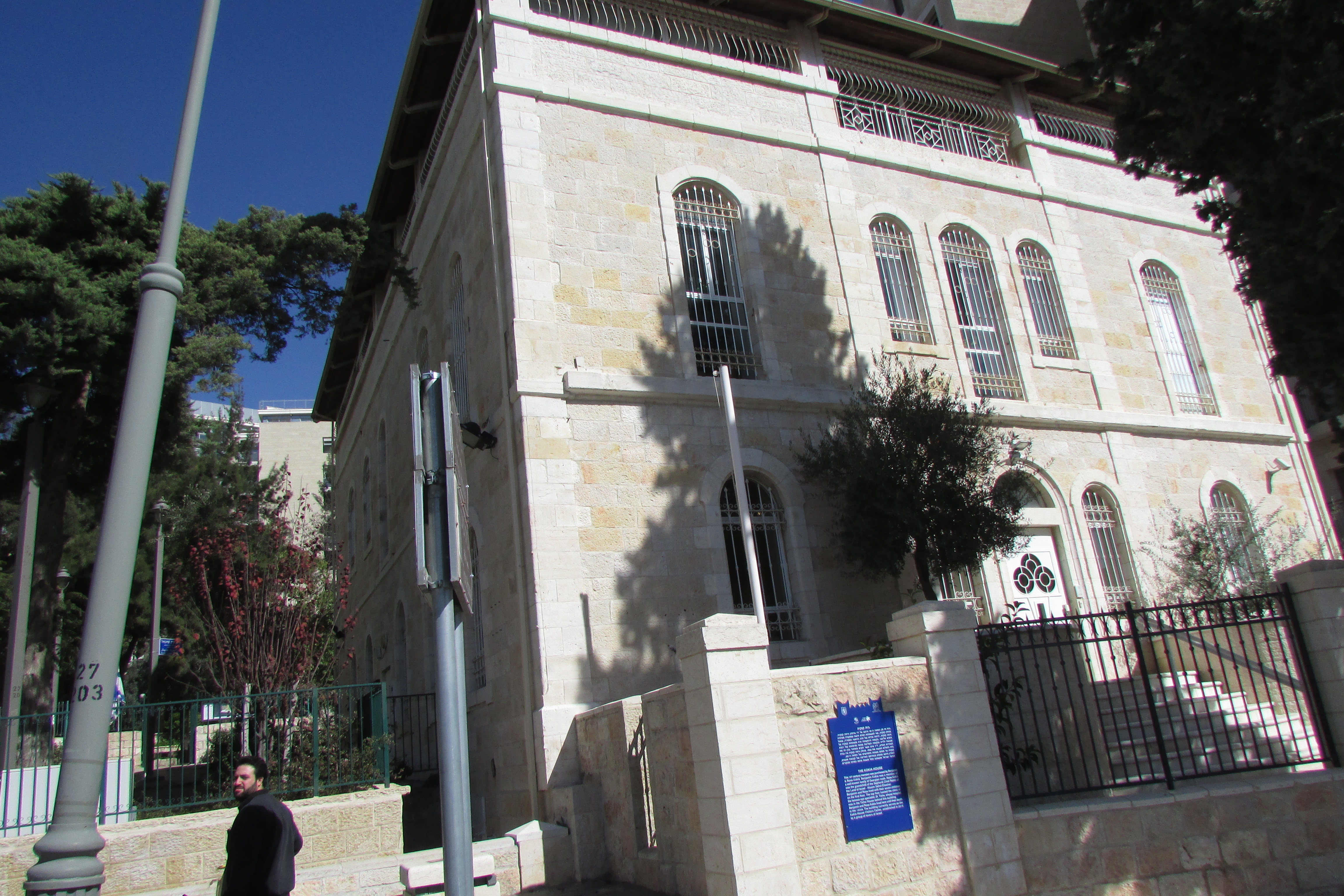 Kokia house